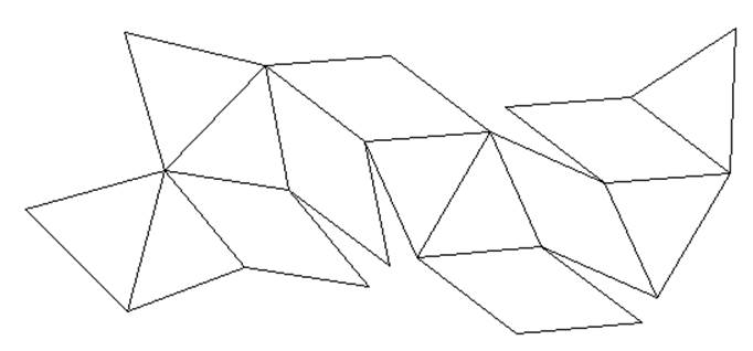 Az él-test hálója